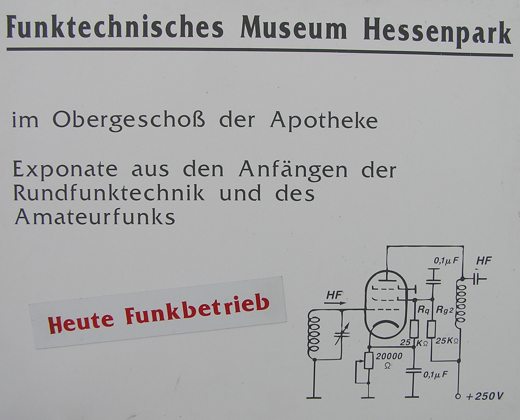 Funktechnisches Museum im Hessenpark, Neu-Anspach, Deutschland